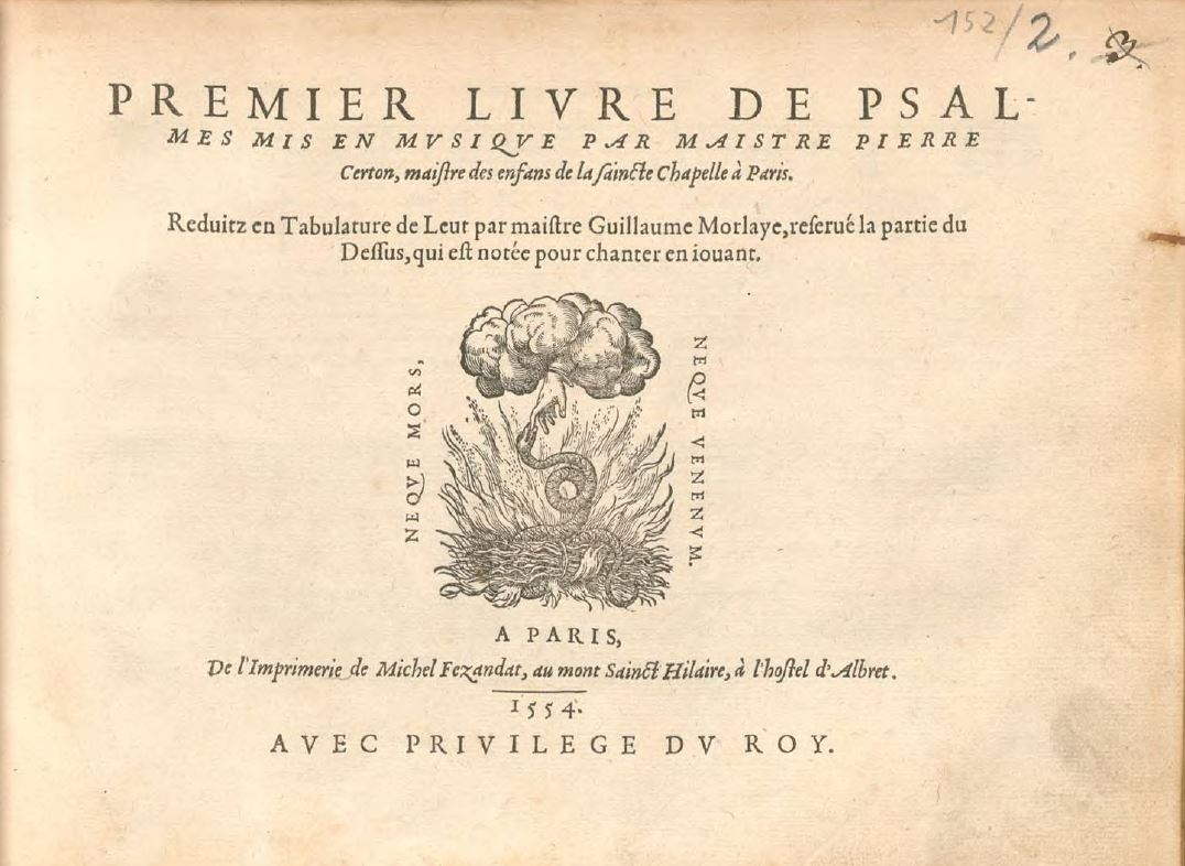 Title page of Pierre Certon, Premier livre de psalmes, réduits au luth (Paris : Michel Fezandat, 1554).